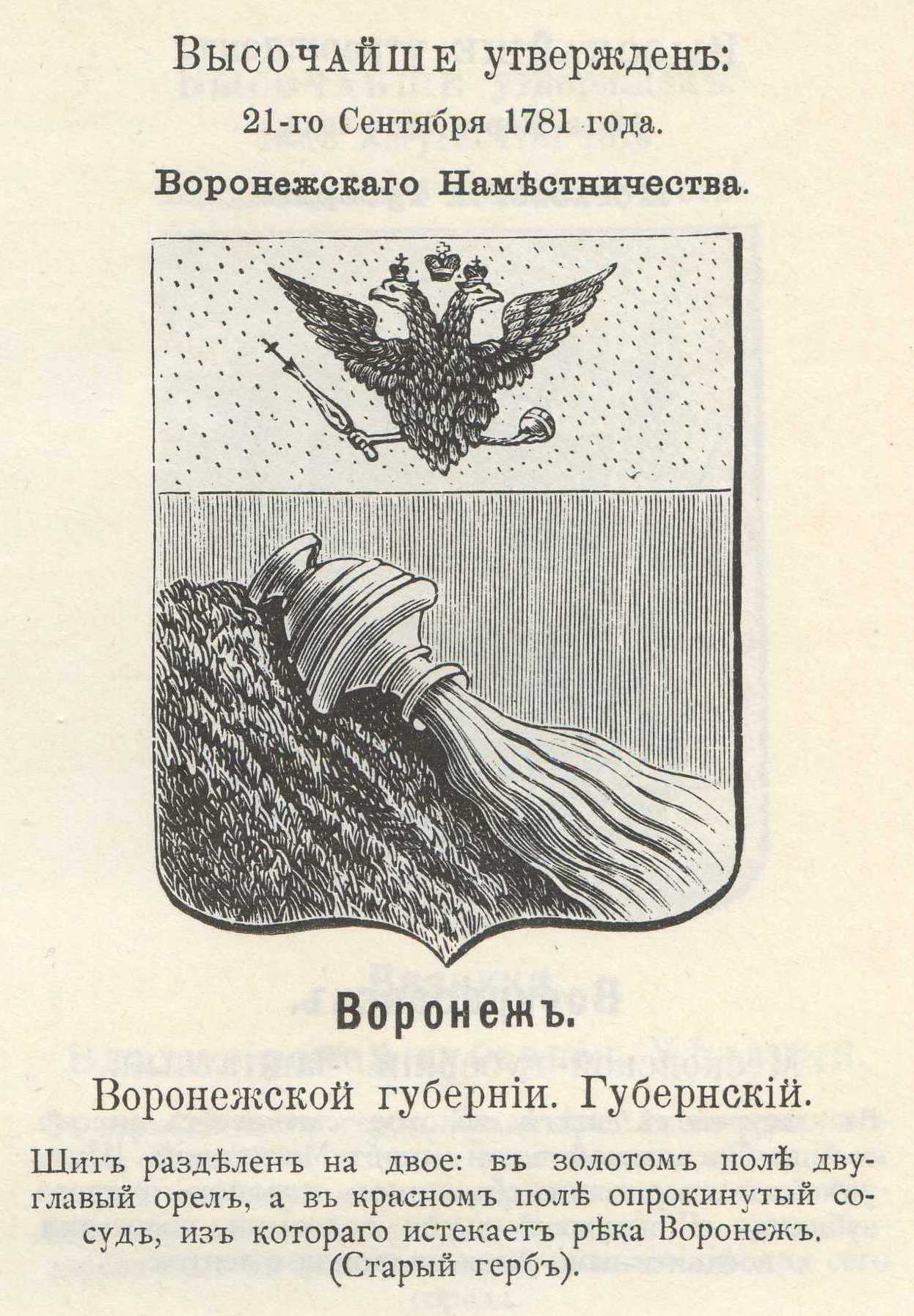 Герб Воронежа Воронежской губернии (с описанием в гербовнике Винклера)